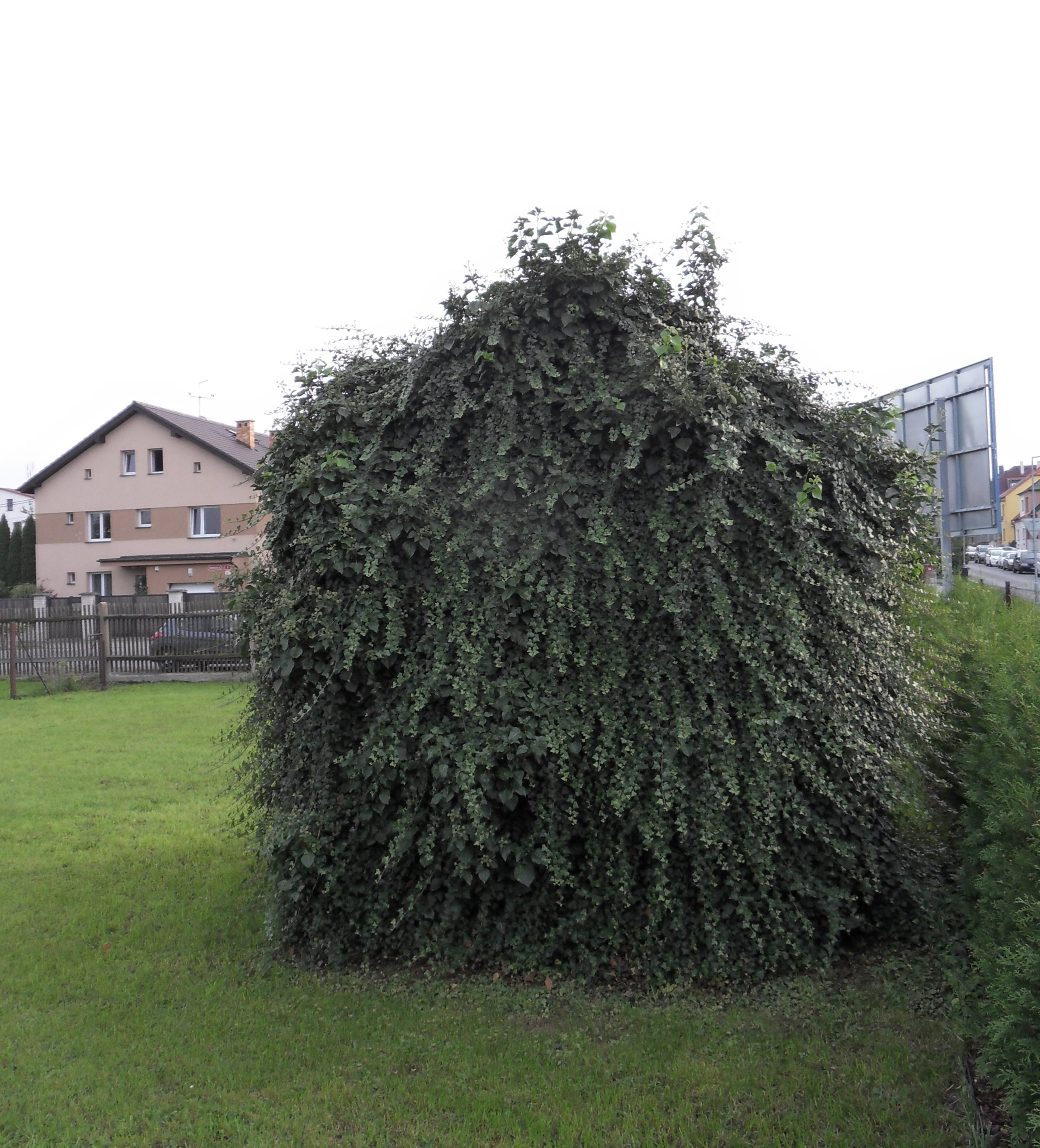 Kaplička v Božkově ve Velenické ulici, Plzeň 2-Božkov, Velenická, proti čp. 607, Plzeň.